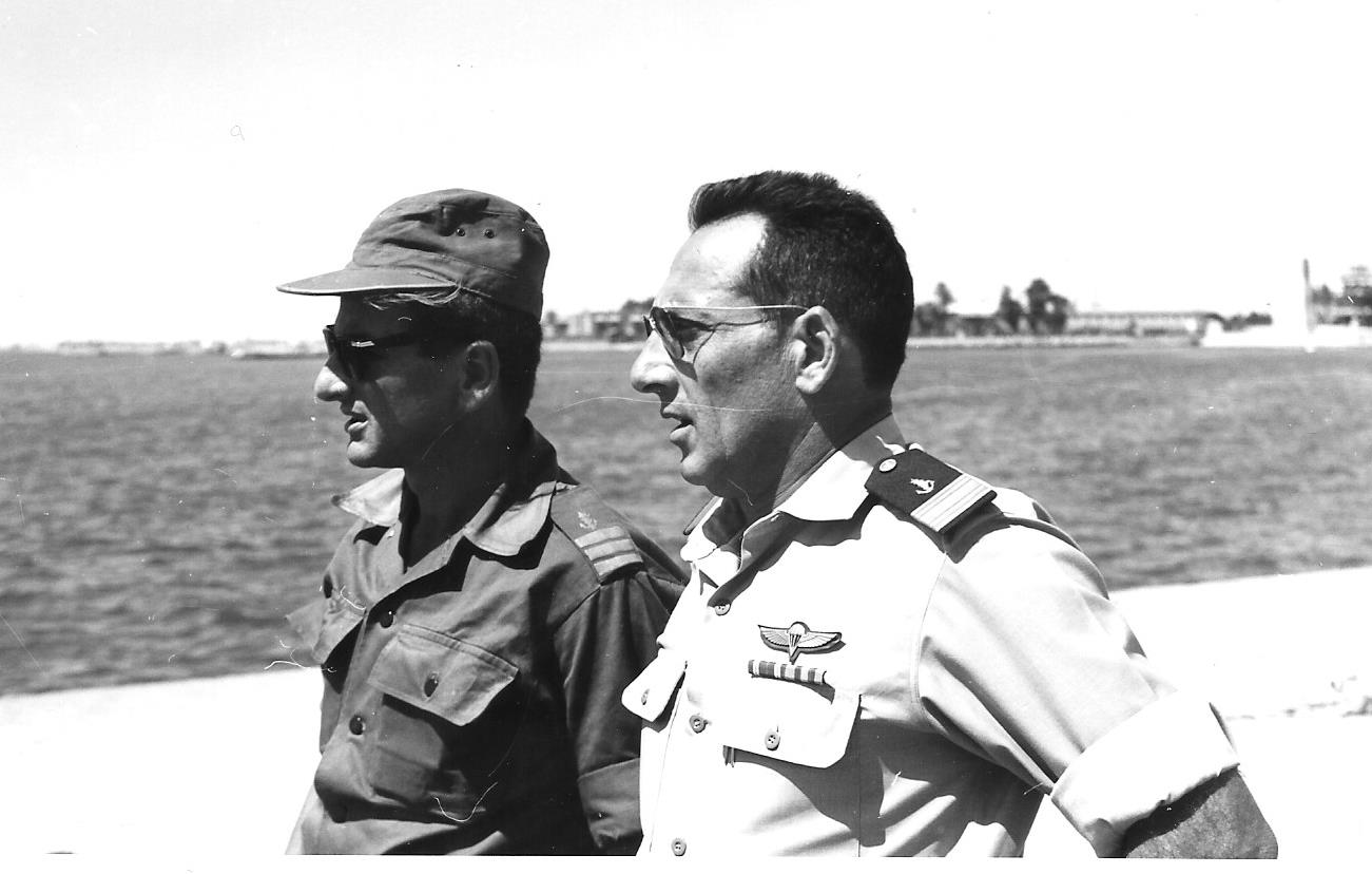 מפקד חיל הים אלוף שלמה אראל עם מפקד שייטת 13 סא"ל דב שפיר בתצפית על תעלת סואץ